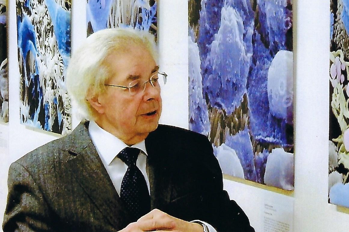 Fotografie des Bochumer Pathologen Prof. Dr. Konrad Morgenroth